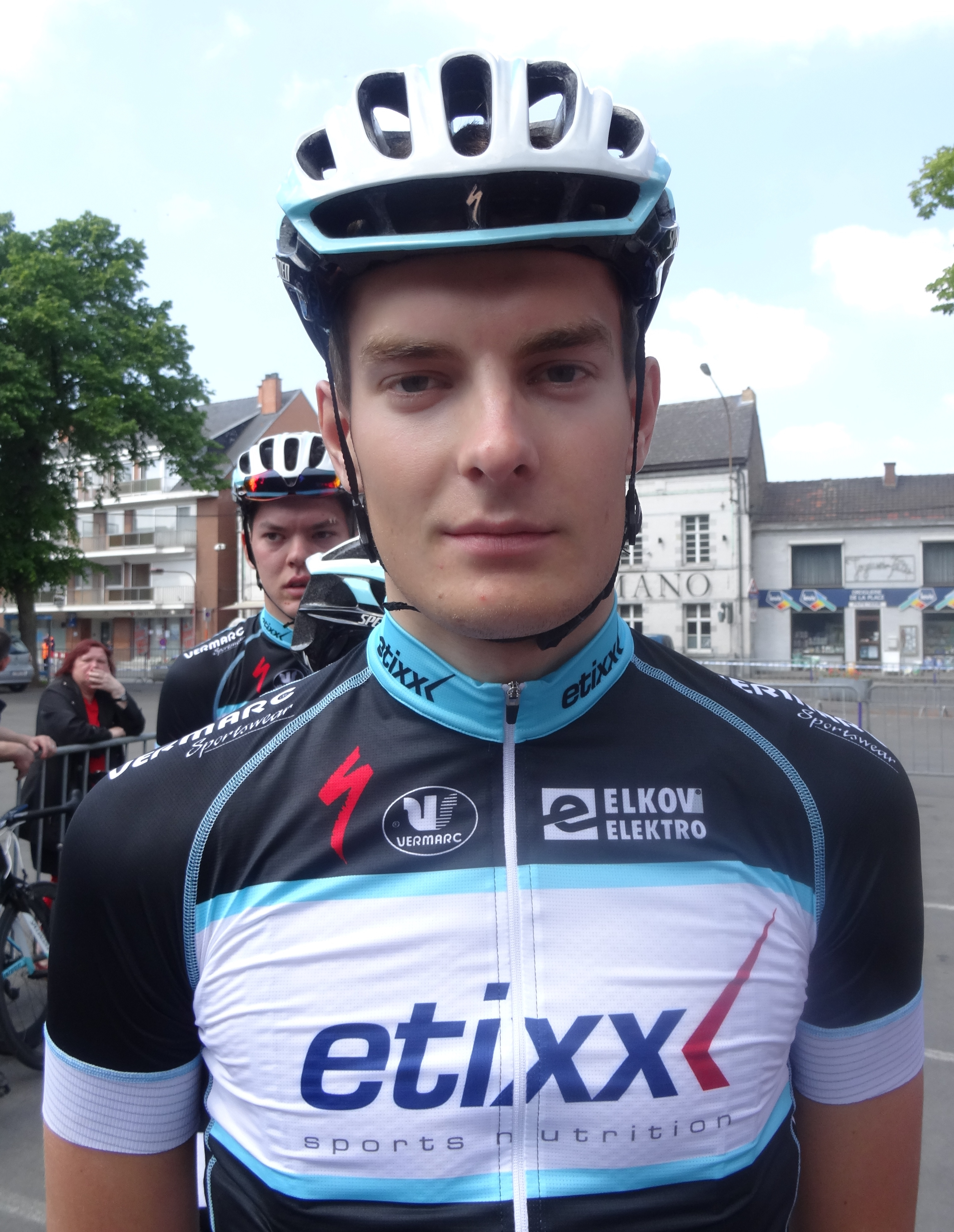 Reportage réalisé le samedi 17 mai à l'occasion du départ du Grand Prix Criquielion 2014 à Boussu, Belgique.